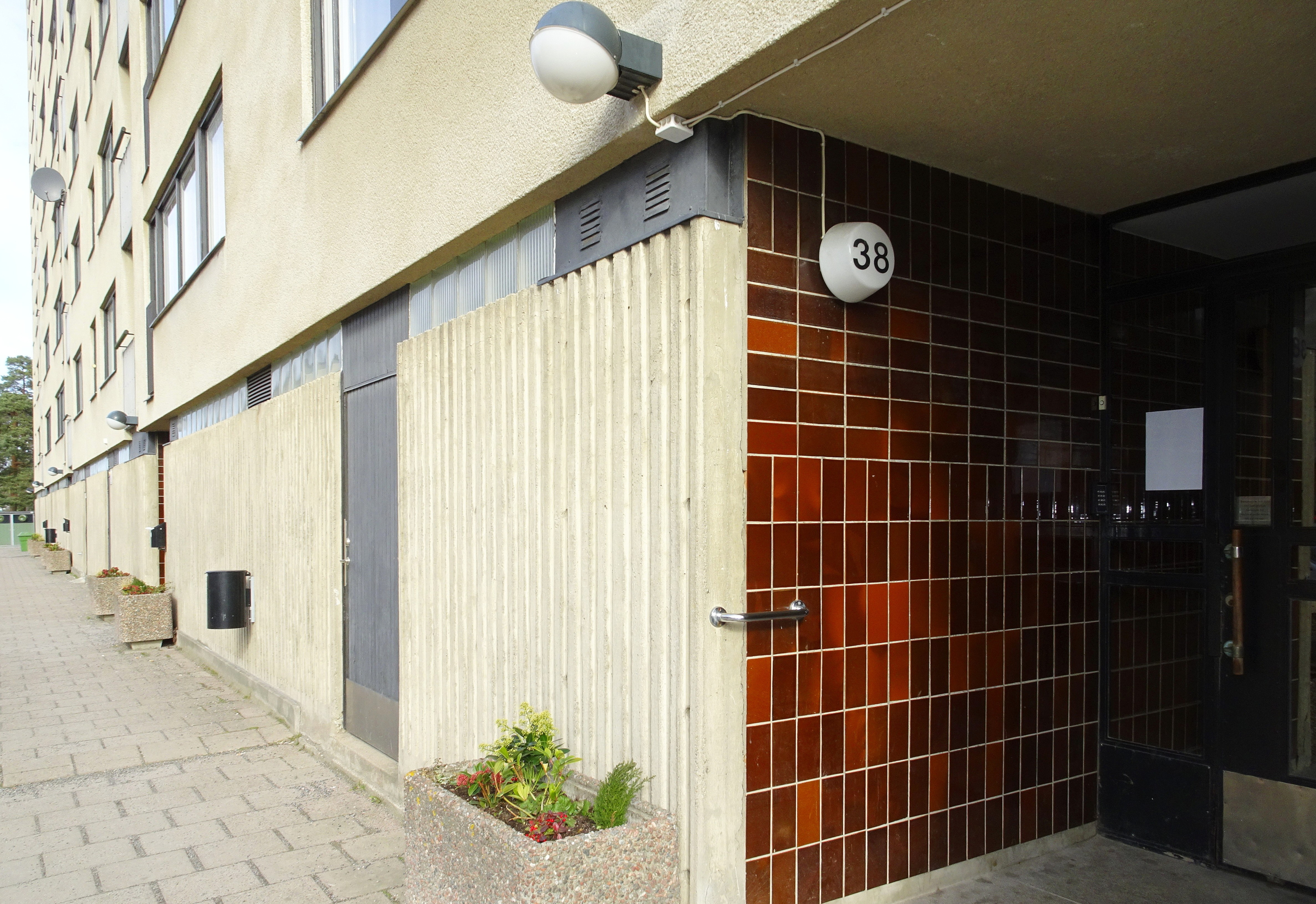 Fastigheten Coldinuorden 3, Bredäng, arkitekt Kjell Abramson byggår 1965